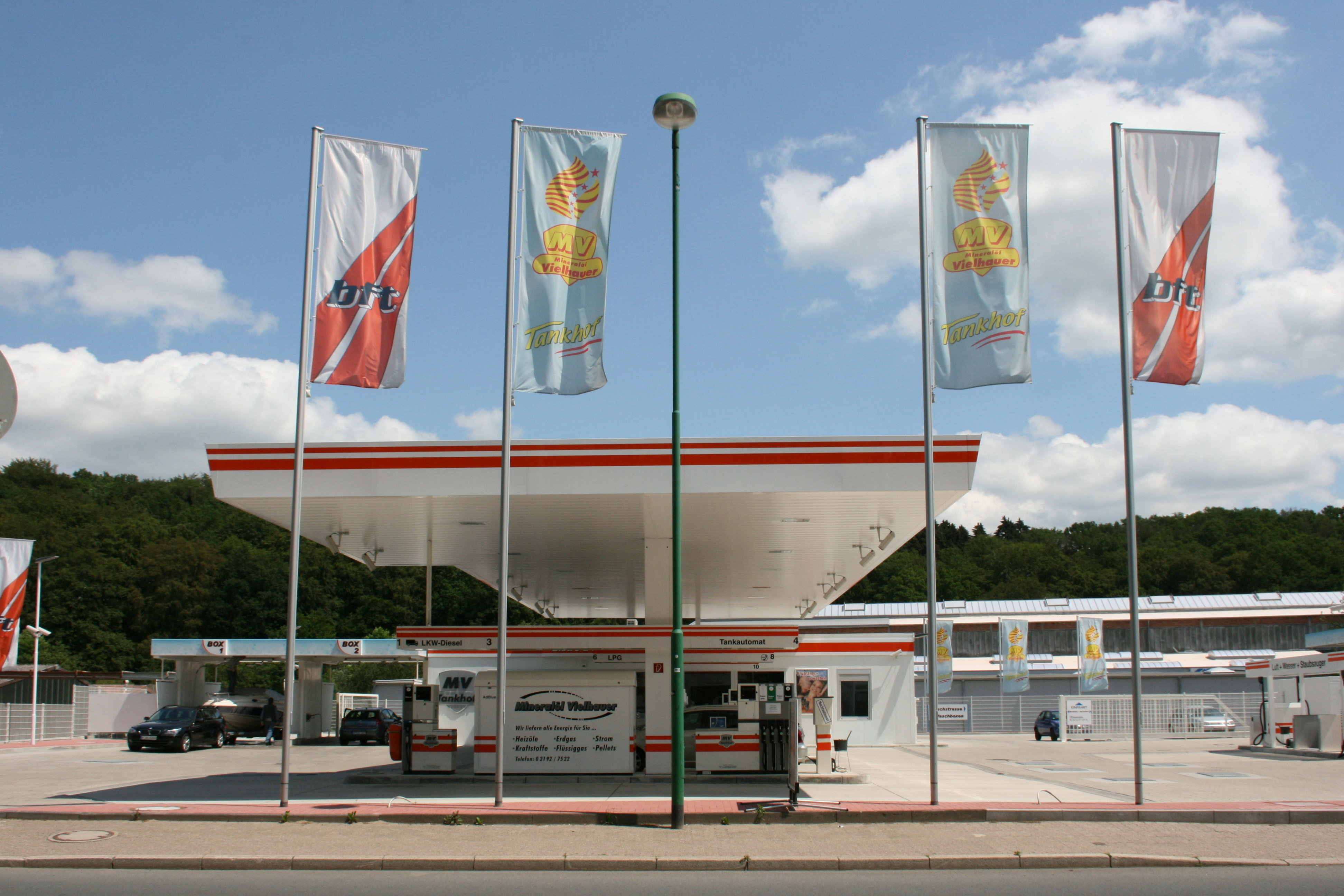 bft-Tankstelle, Peterstraße 59 in Hückeswagen